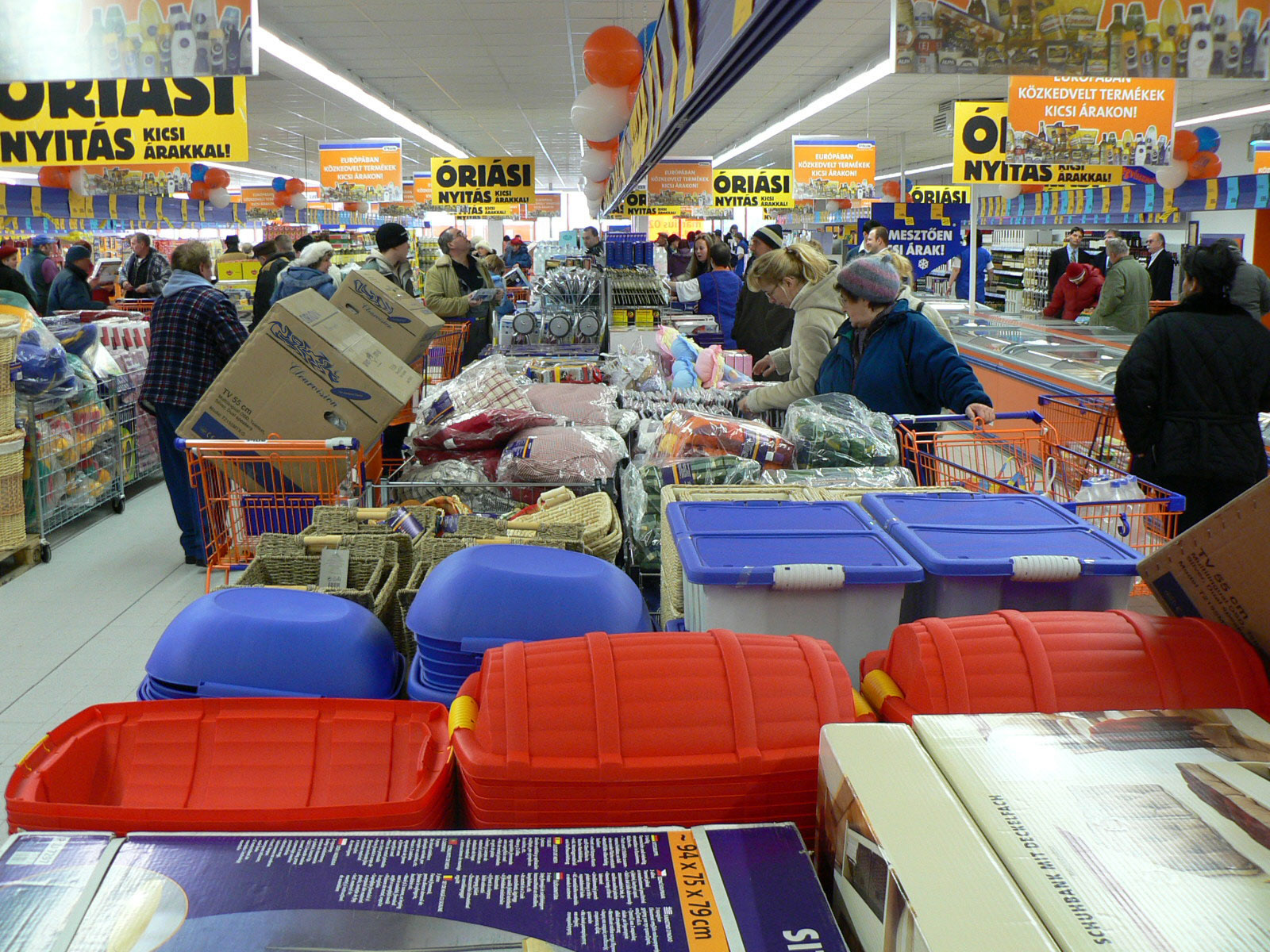 A solymári Plus áruház a megnyitása napján